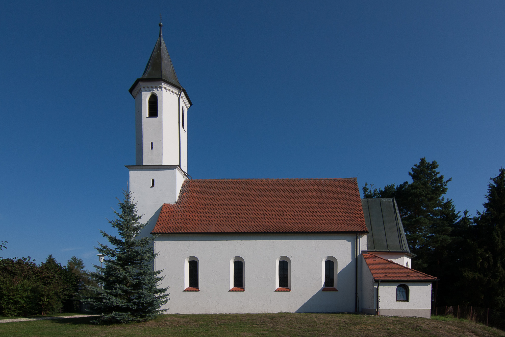 Anfang 16. Jahrhundert; mit Ausstattung.This is a photograph of an architectural monument.